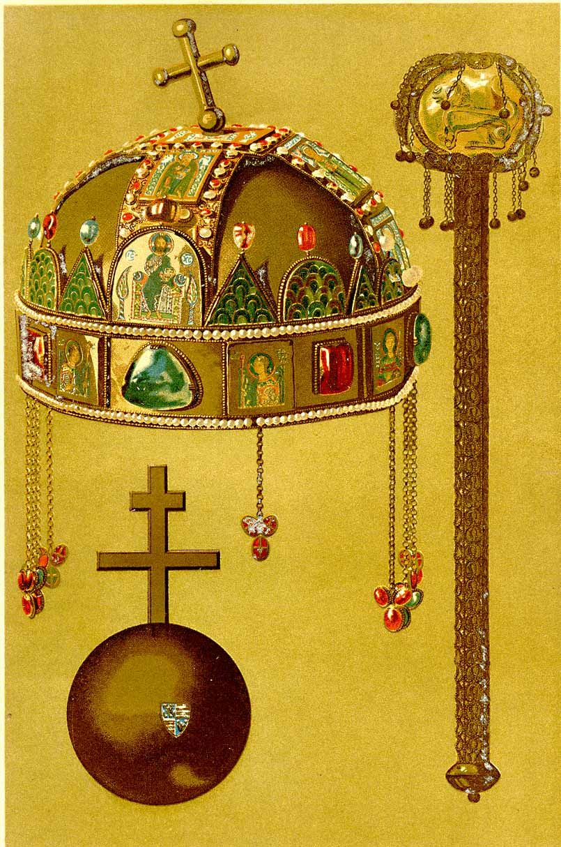 A magyar koronázási jelvények A Pallas nagy lexikona X. kötetében